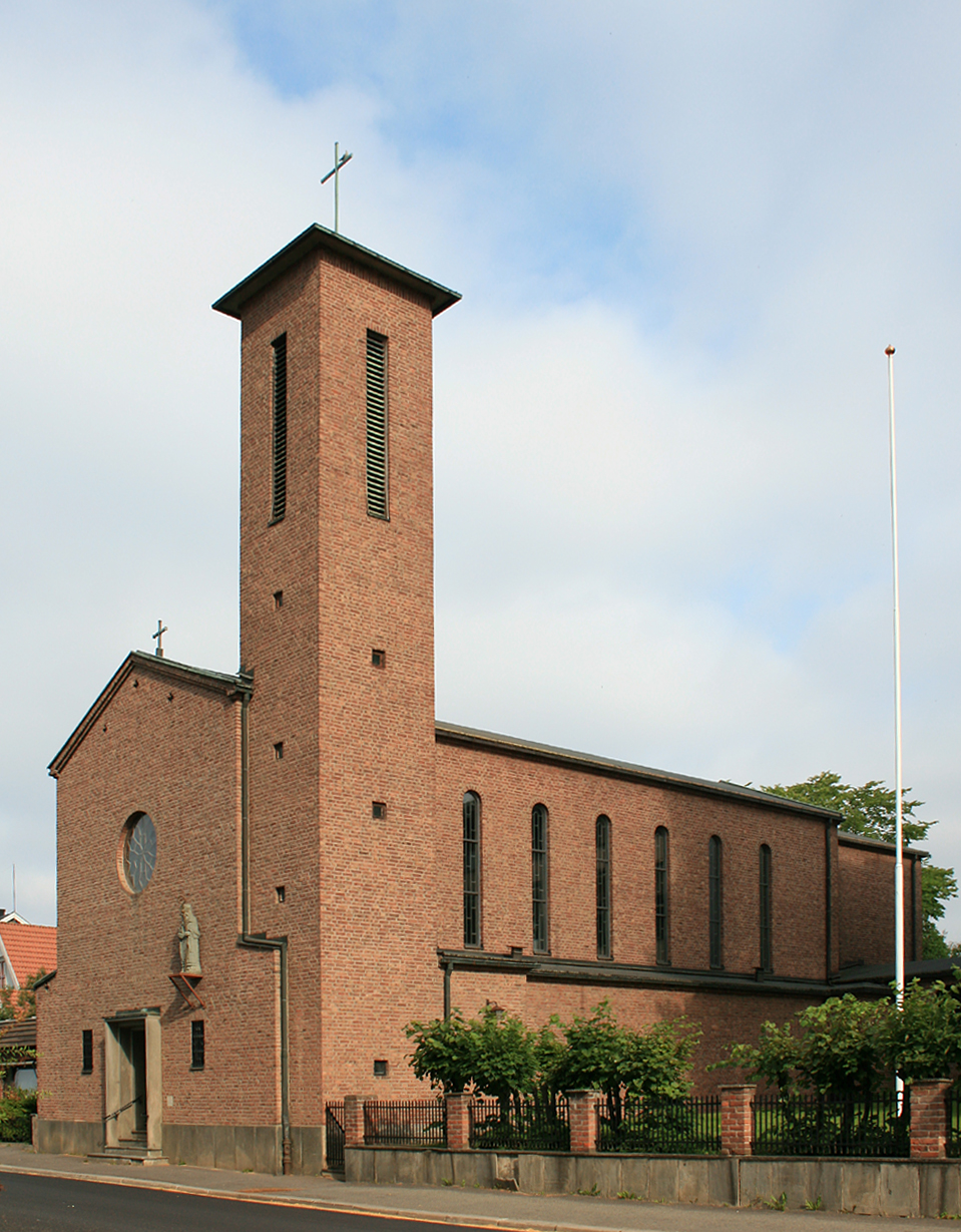 St. Torfinn katolske kirke, Hamar. Bygd 1930. Arkitekt: H.Sund.